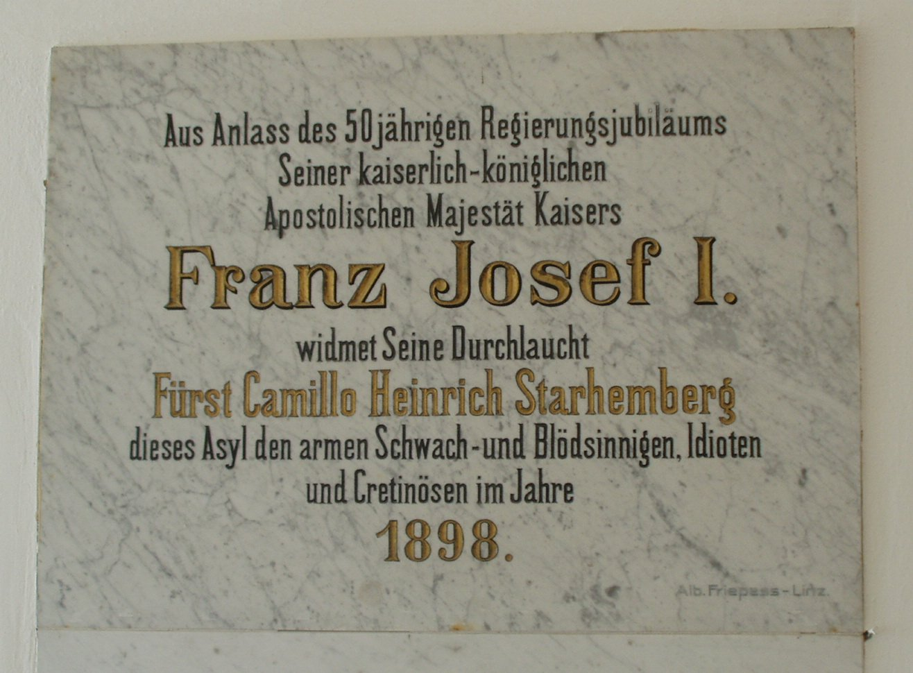 1898 schenkt Camillo Heinrich Fürst Starhemberg anlässlich des 50-jährigen Thronjubiläums von Kaiser Franz Josef dem OÖ.LWV das Renaissanceschloss Hartheim in Alkoven. Darin beginnt der Verein eine Einrichtung für Menschen mit Behinderungen, bezeichnet als Anstalt für die "armen Schwach- und Blödsinnigen, Idioten und Cretinösen", zu etablieren. Sie wird 1898 unter der Leitung von Alois Walcher (Priester und Direktor der k. u. k. Taubstummenlehranstalt in Linz) eröffnet.